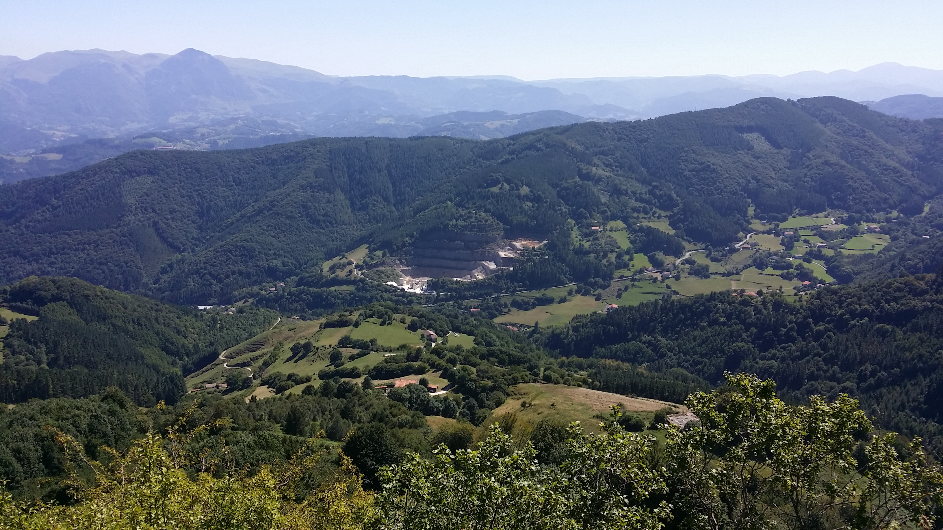 Mendikute